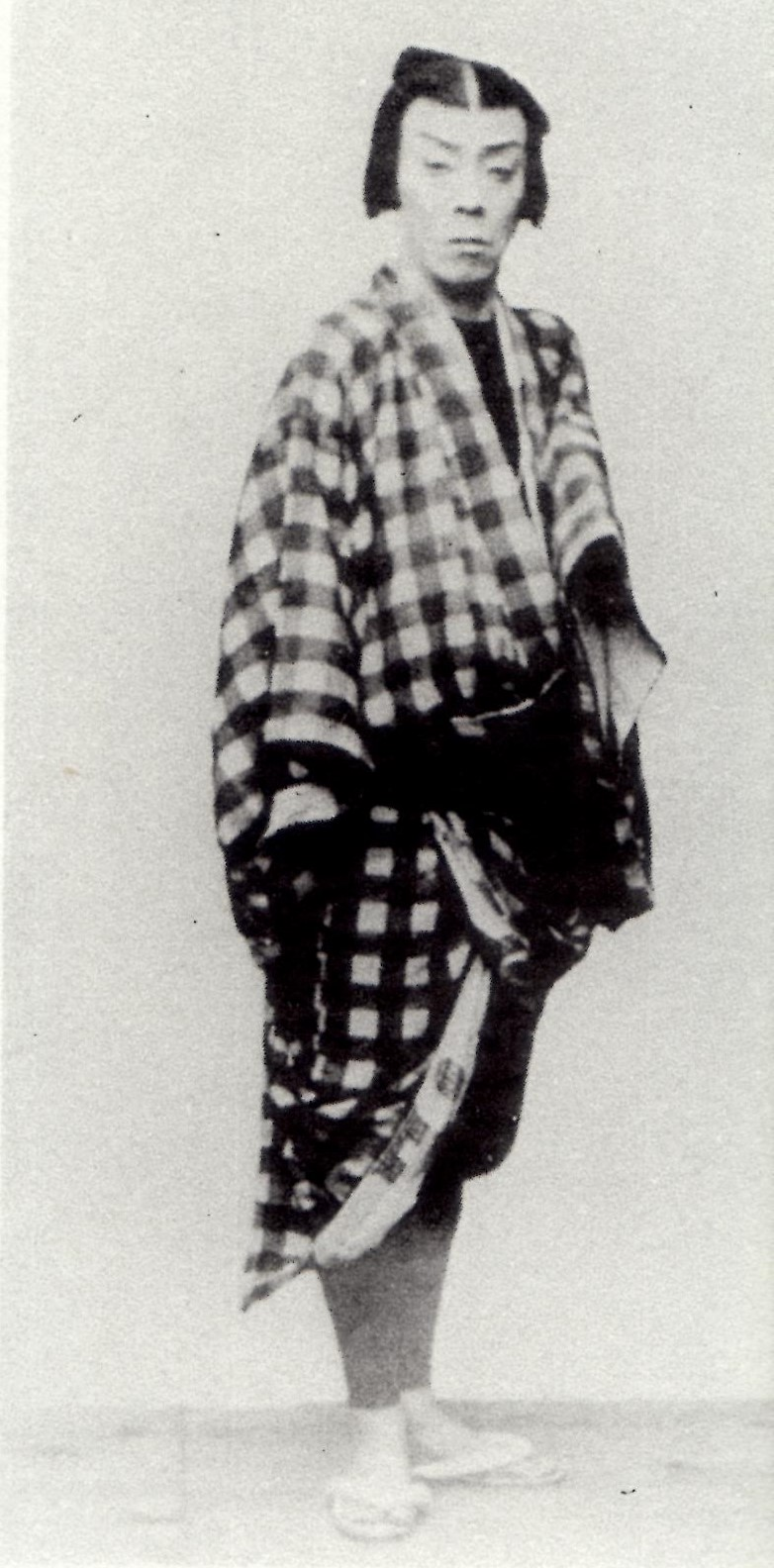 歌舞伎役者の五代目坂東蓑助（1864-1909）。三河国碧海郡池鯉鮒出身。